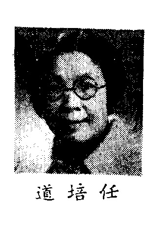 中文（中国大陆）: 制憲國民大會代表任培道